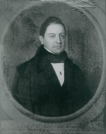 Jacint Feliu Domènech i Sastre (Barcelona, 23 de novembre de 1802 – 1863). Polític, financer i advocat. Fou alcalde de Barcelona (Agost 1839 - Juny 1840), de Madrid (1843) diputat, senador i tres vegades ministre d'Isabel II.